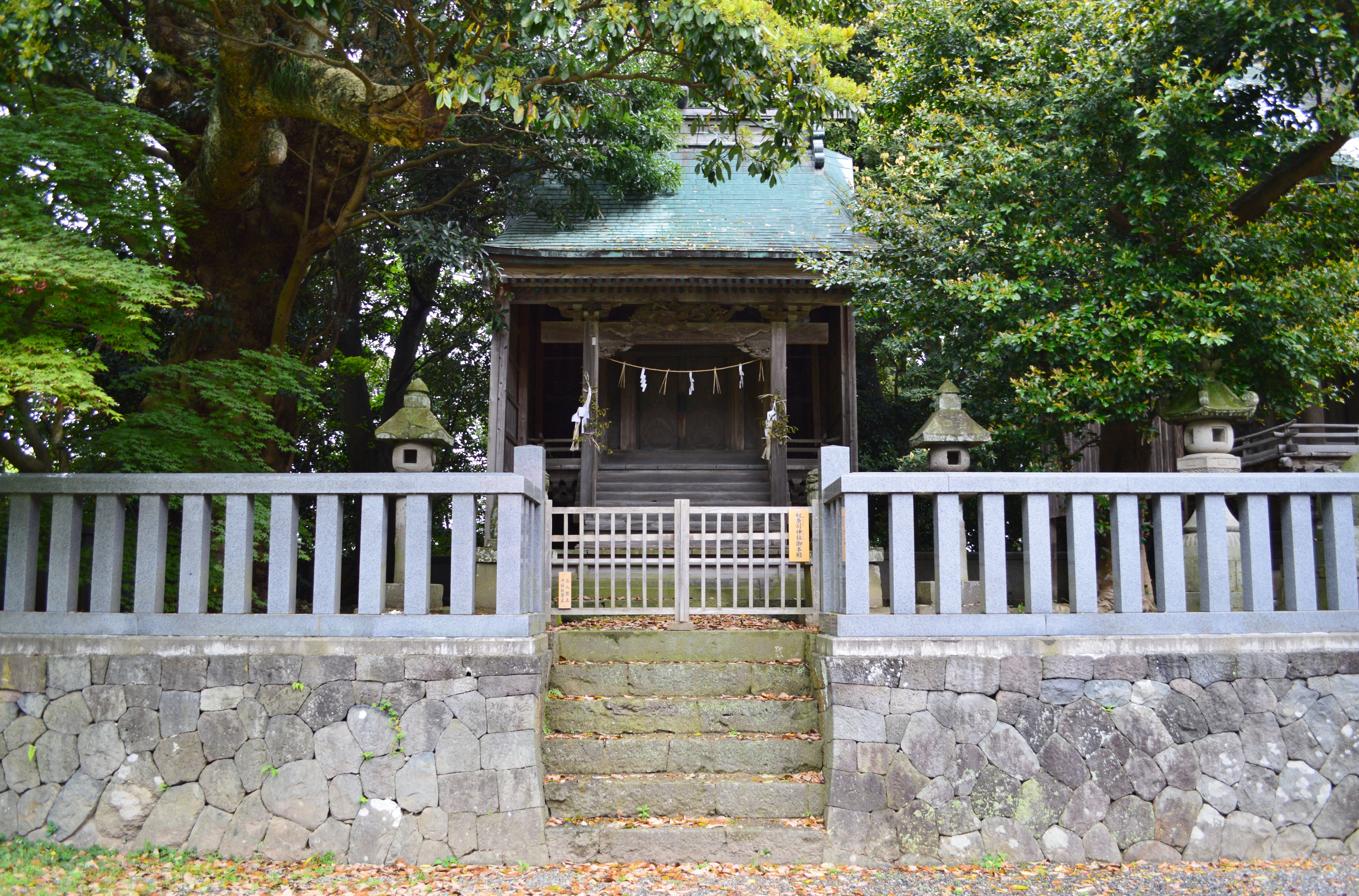 天津神社 (糸魚川市) 境内奴奈川神社 Nikon D3200